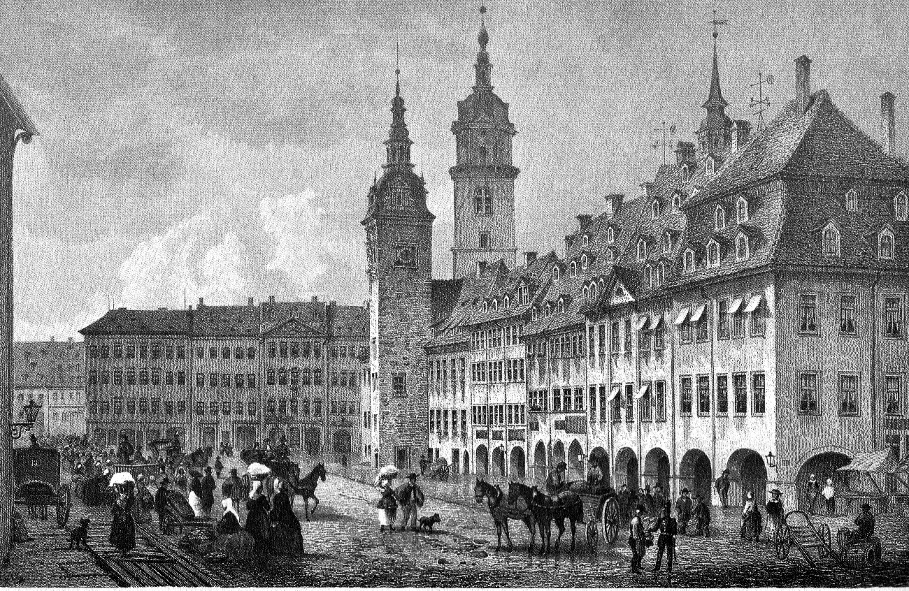 Historische Ansicht von Chemnitz in Sachsen. Stahlstich.